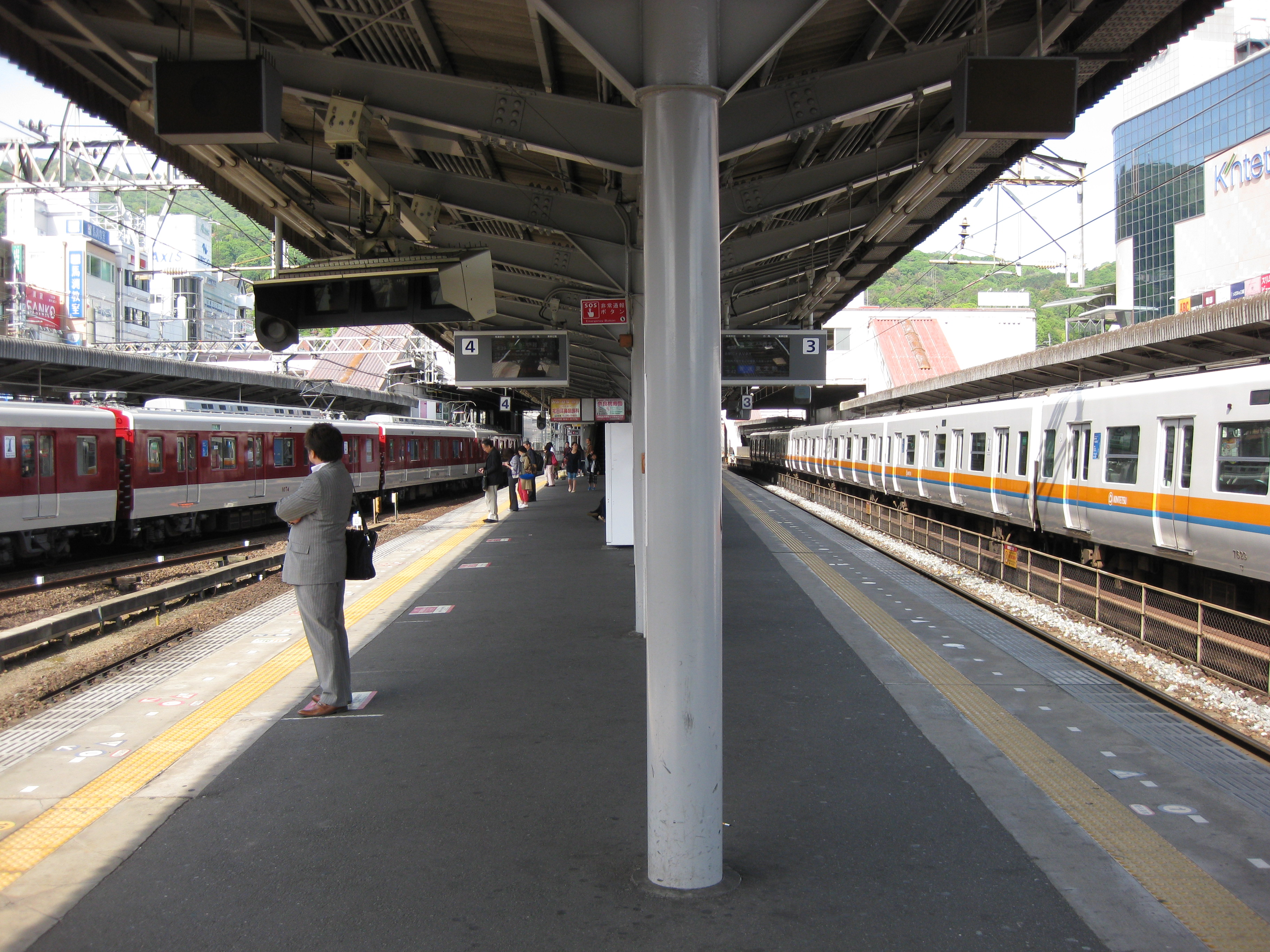 生駒駅プラットホーム